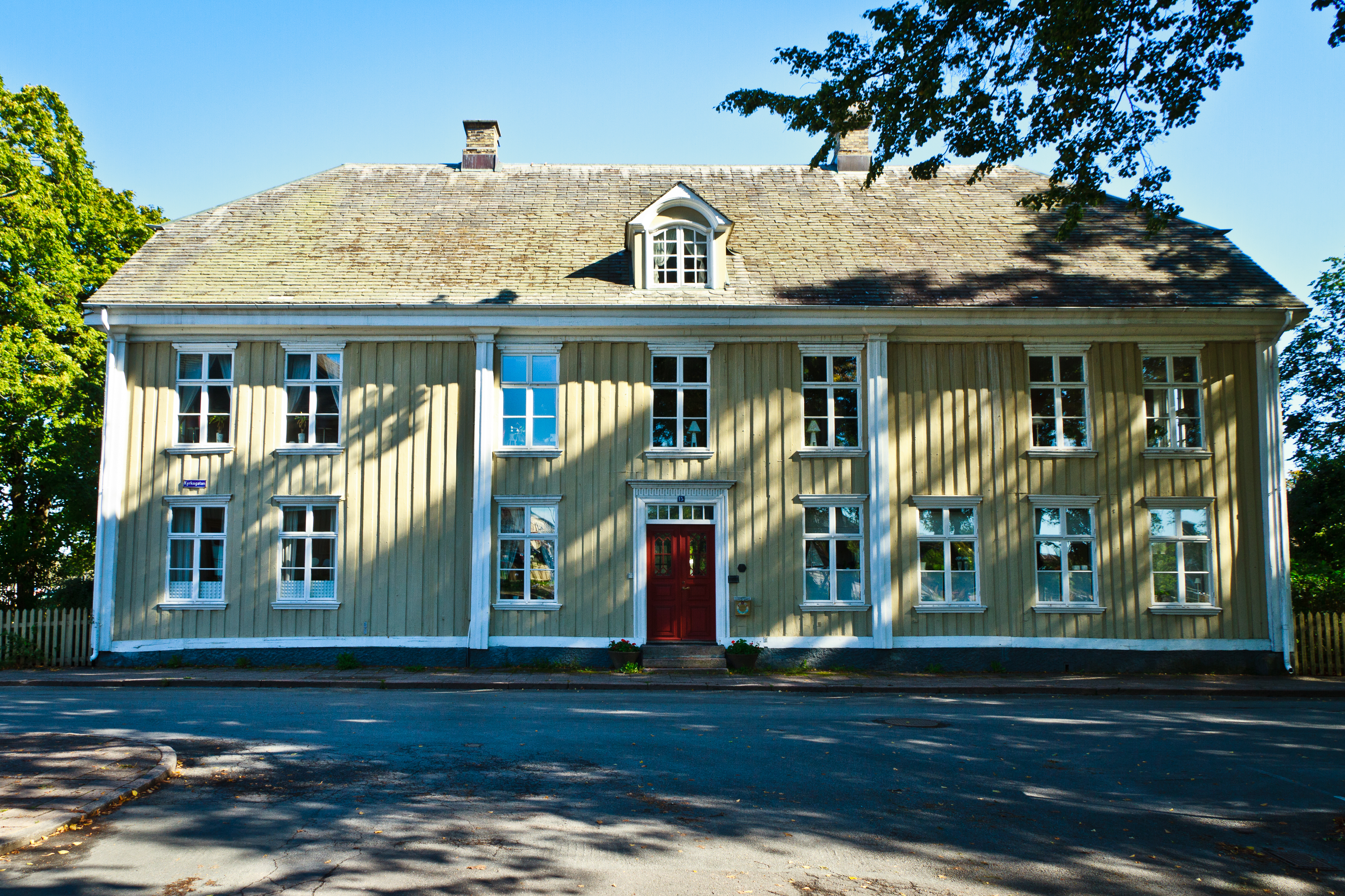 Kronan Större 3 och 7, DAHLGRENSGÅRDEN.